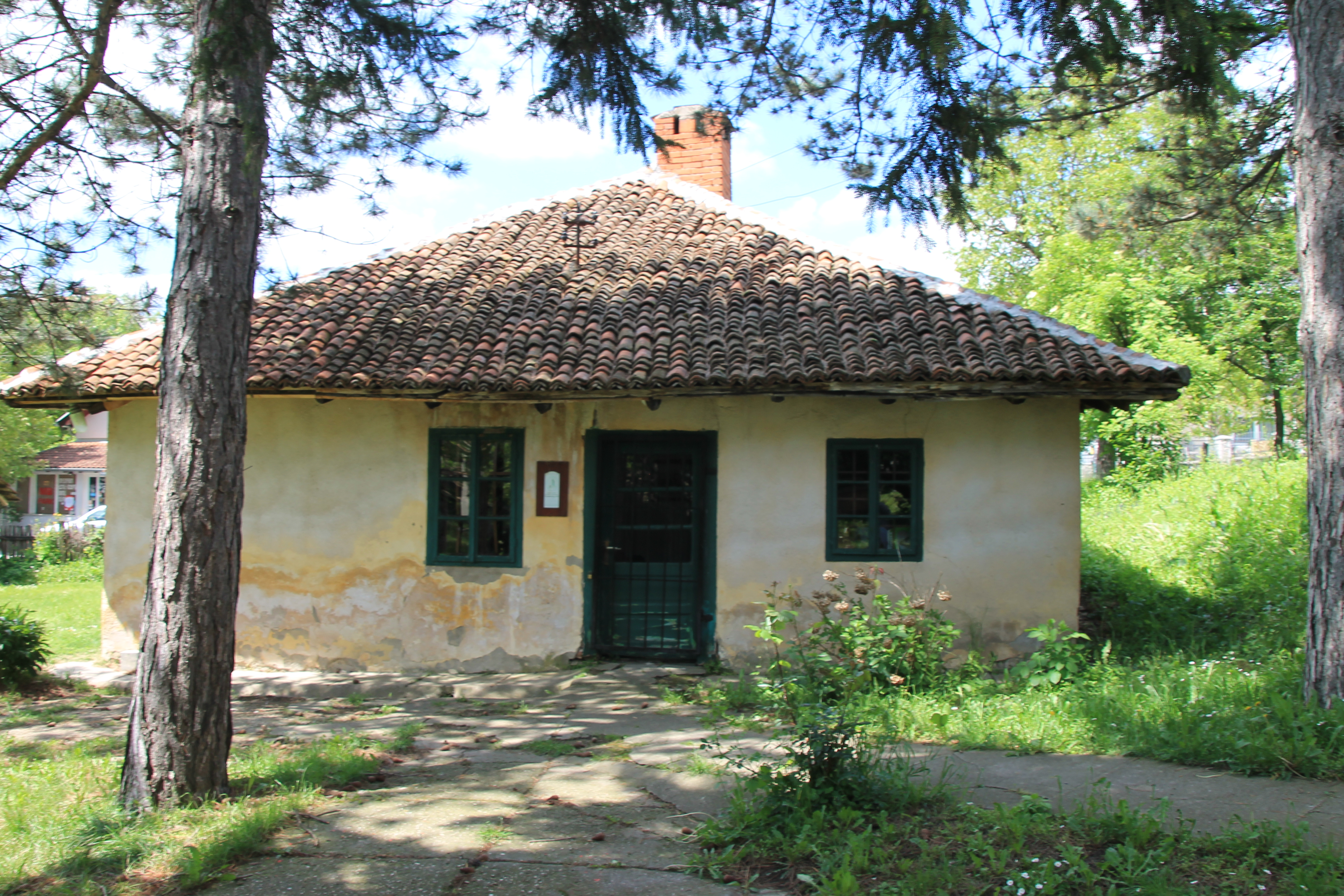 Okućnica Ilije Miloševića